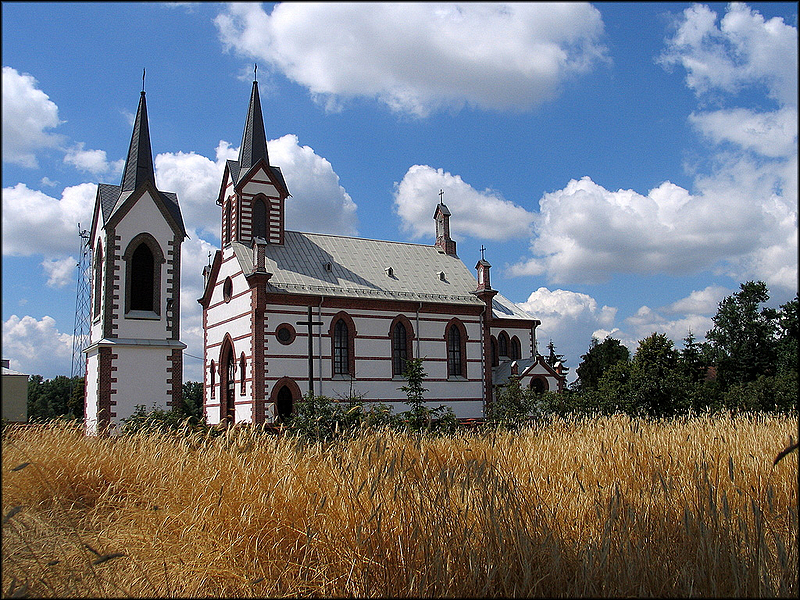 Kościół pw. św. Jadwigi Śląskiej w Samogoszczy (XIX w.; neogotyk); Województwo mazowieckie, powiat garwoliński, gmina Maciejowice